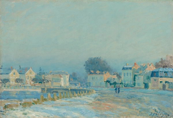 Obj. No. 83.52Alfred Sisley (French, 1839–1899)The Watering Pond at Marly with Hoarfrost (L'Abreuvoir à Marly - gelée blanche), 1876Oil on canvas14⅞”H x 21⅝”W37.78 cm x 54.93 cmSigned and dated lower right, Sisley 76Image must be credited with the following collection and photo credit lines:Virginia Museum of Fine Arts, Richmond. Collection of Mr. and Mrs. Paul Mellon.Photo: Katherine Wetzel © Virginia Museum of Fine Arts